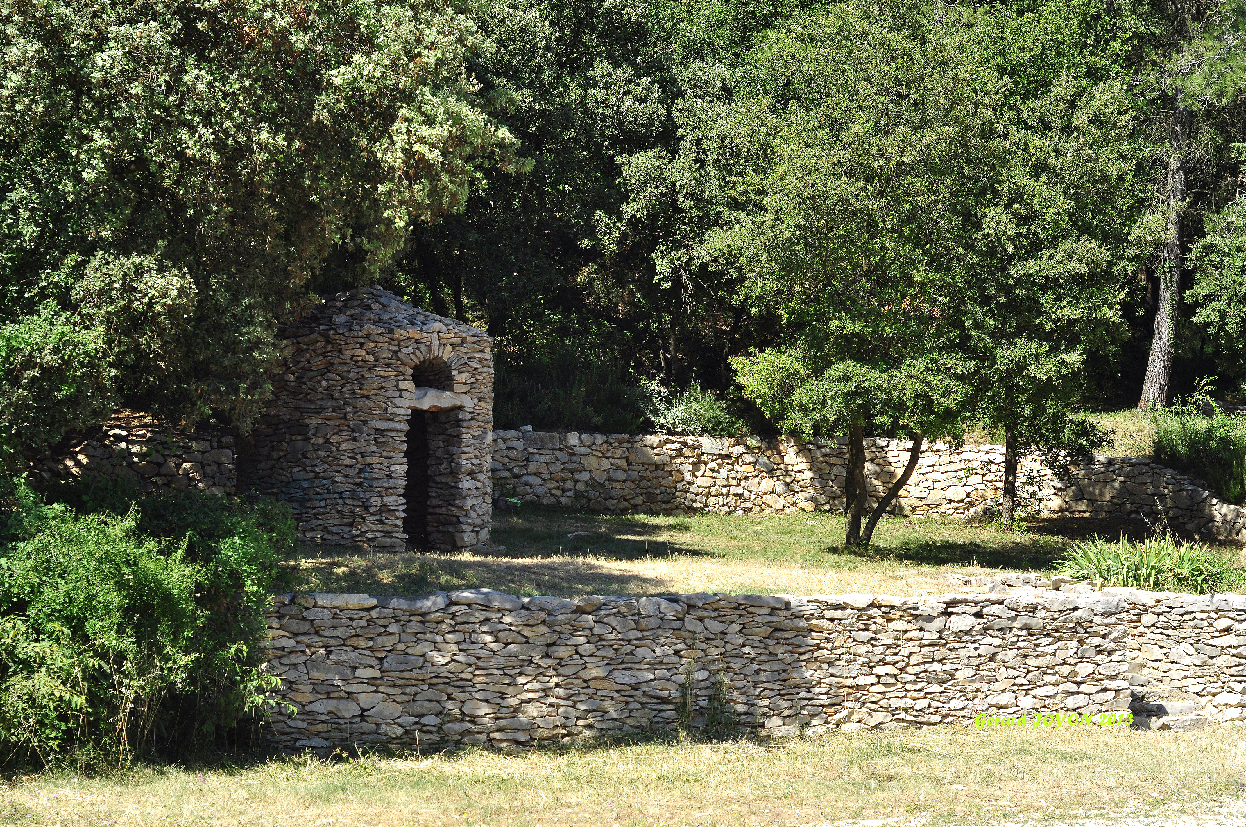 Cette capitelle , petite construction en pierres sèches(sans ciment) est une construction typique des garrigues . POULX est la capitale des Garrigues.